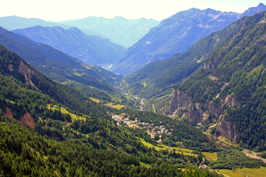 Panorama della Val Cairasca dal sentiero Alpe Ciamporino-Alpe Veglia, sopra San Domenico.